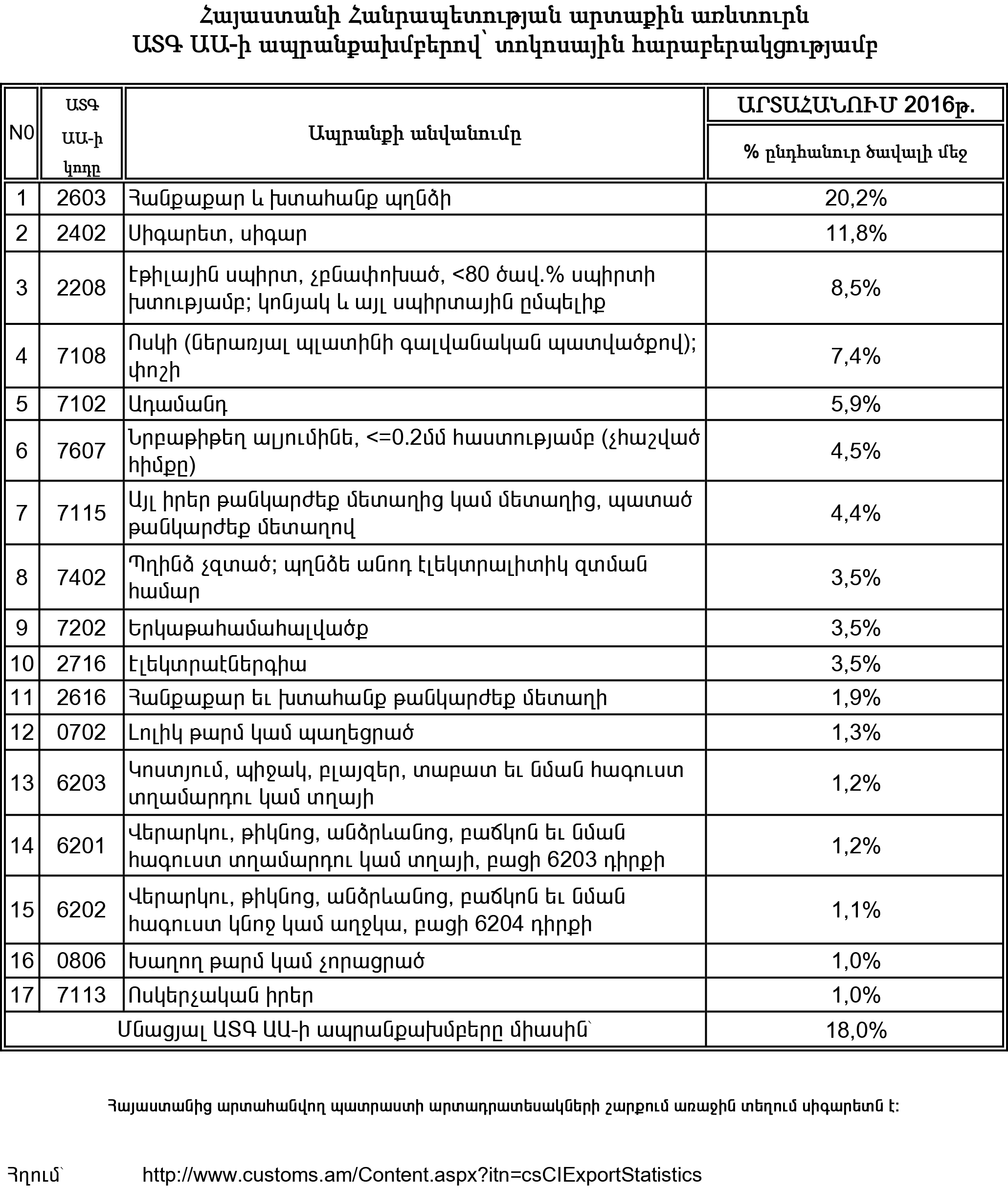 Հայաստանից արտահանվող պատրաստի արտադրատեսակների շարքում առաջին տեղում սիգարետն է